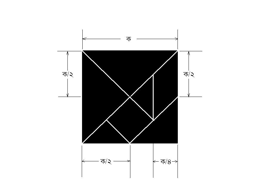 ট্যানগ্রাম তৈরির প্রথম ধাপ.